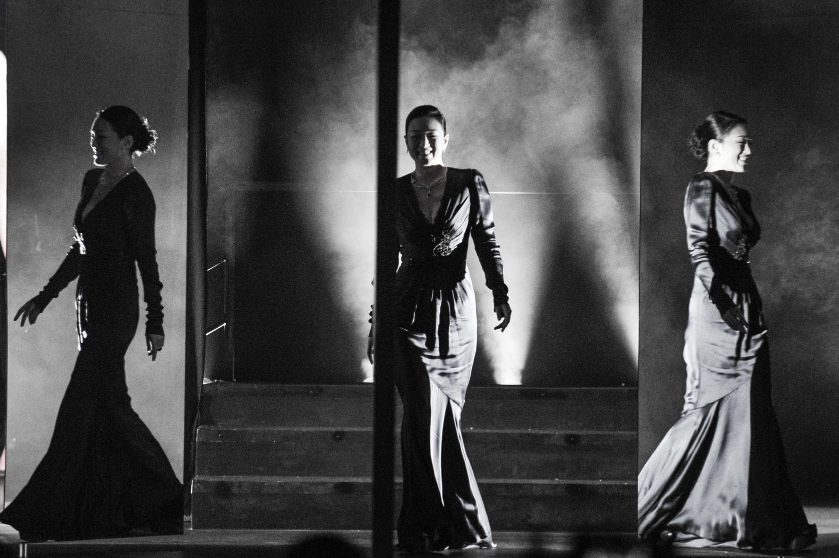 巩俐 (2013)